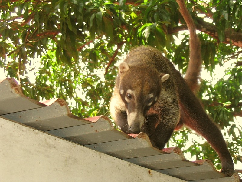 A Coati in Nosara, Costa Rica